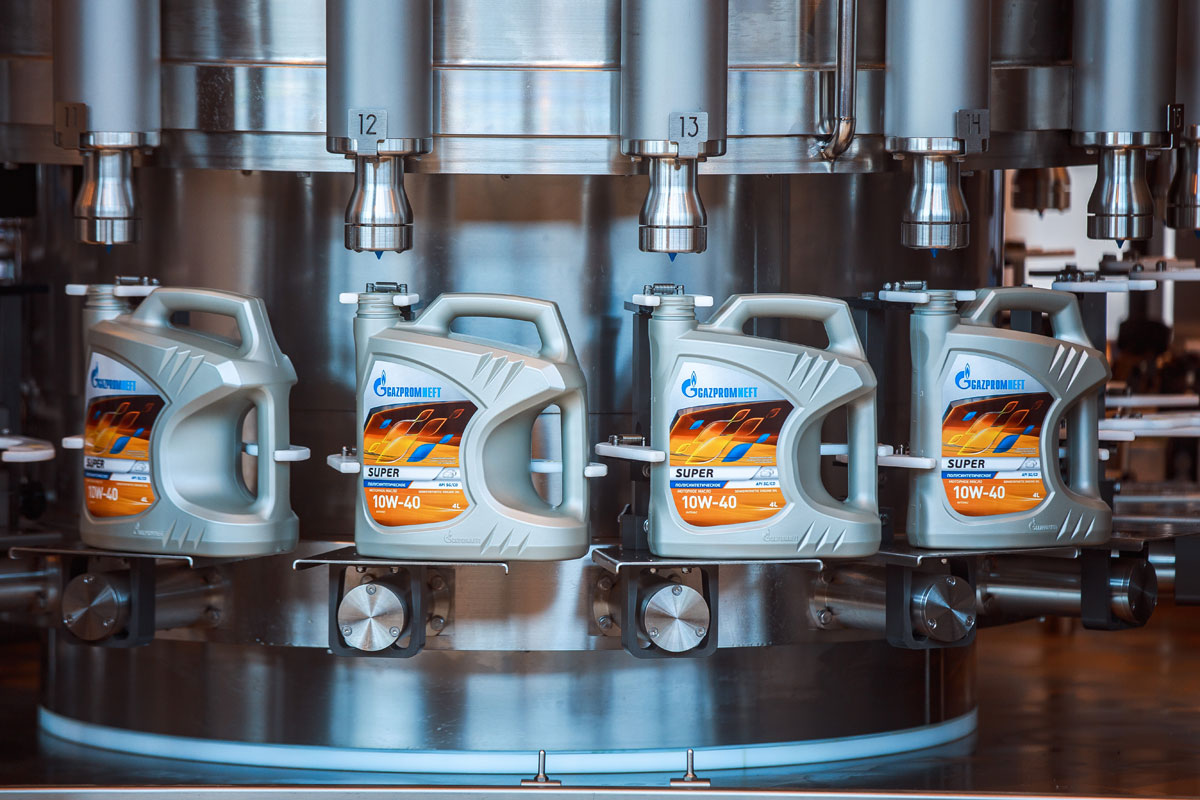 Омский завод смазочных материалов. Фото с официального сайта ООО "Газпромнефть - Смазочные материалы", иллюстрирующее деятельность компании.